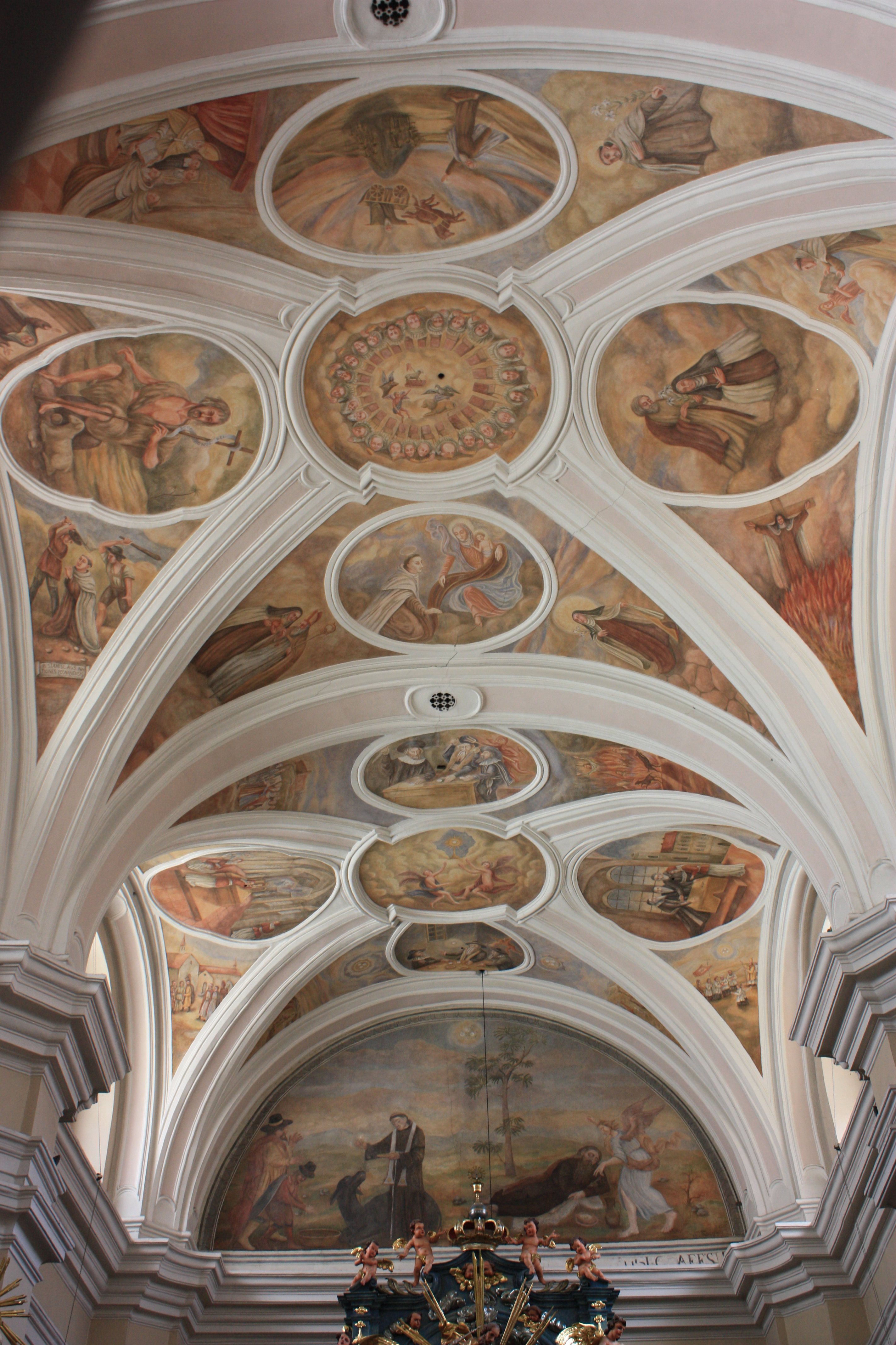 Kościół Najświętszej Krwi Pana Jezusa w Poznaniu. Sklepienie.